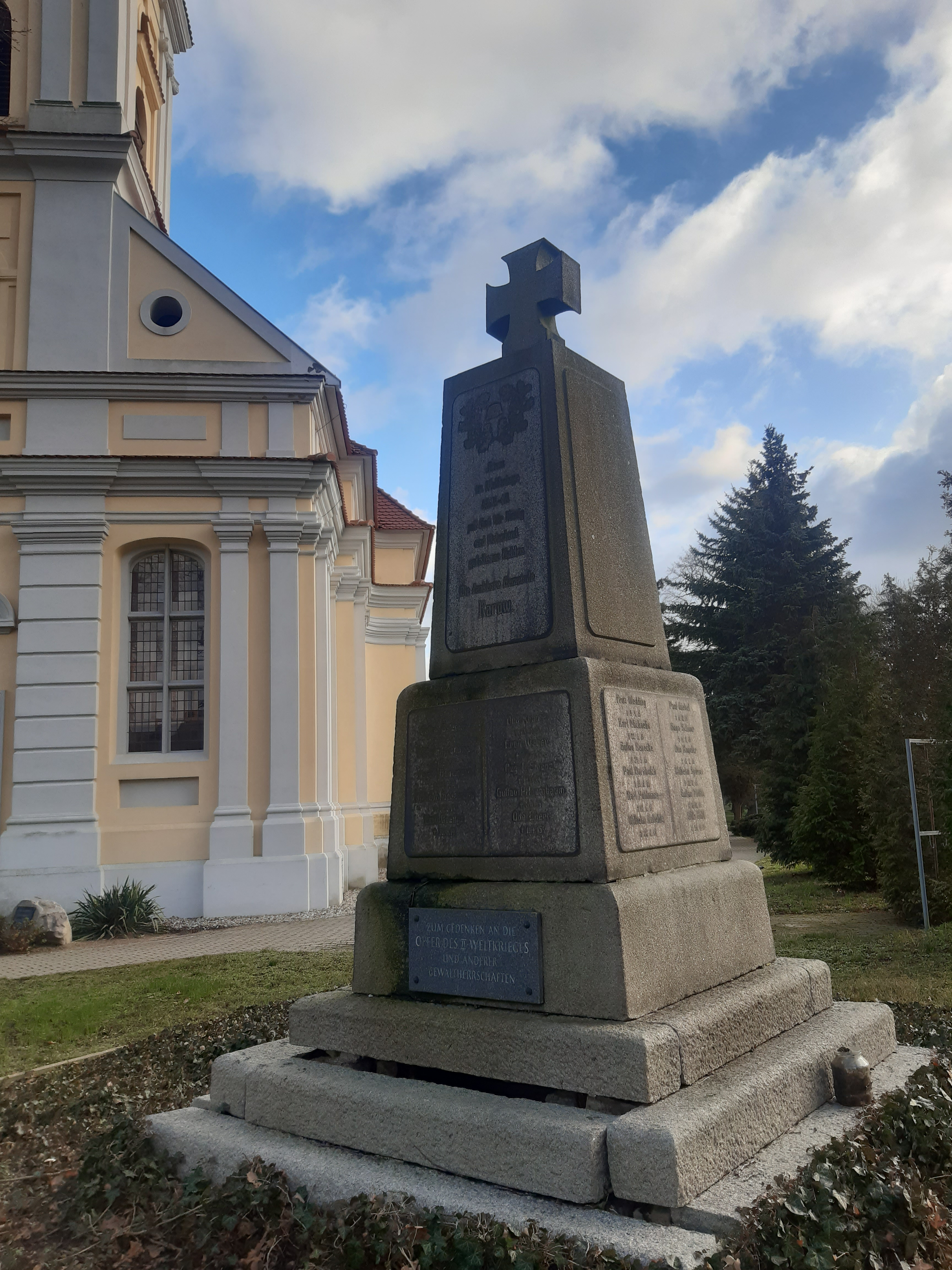 Kriegerdenkmal